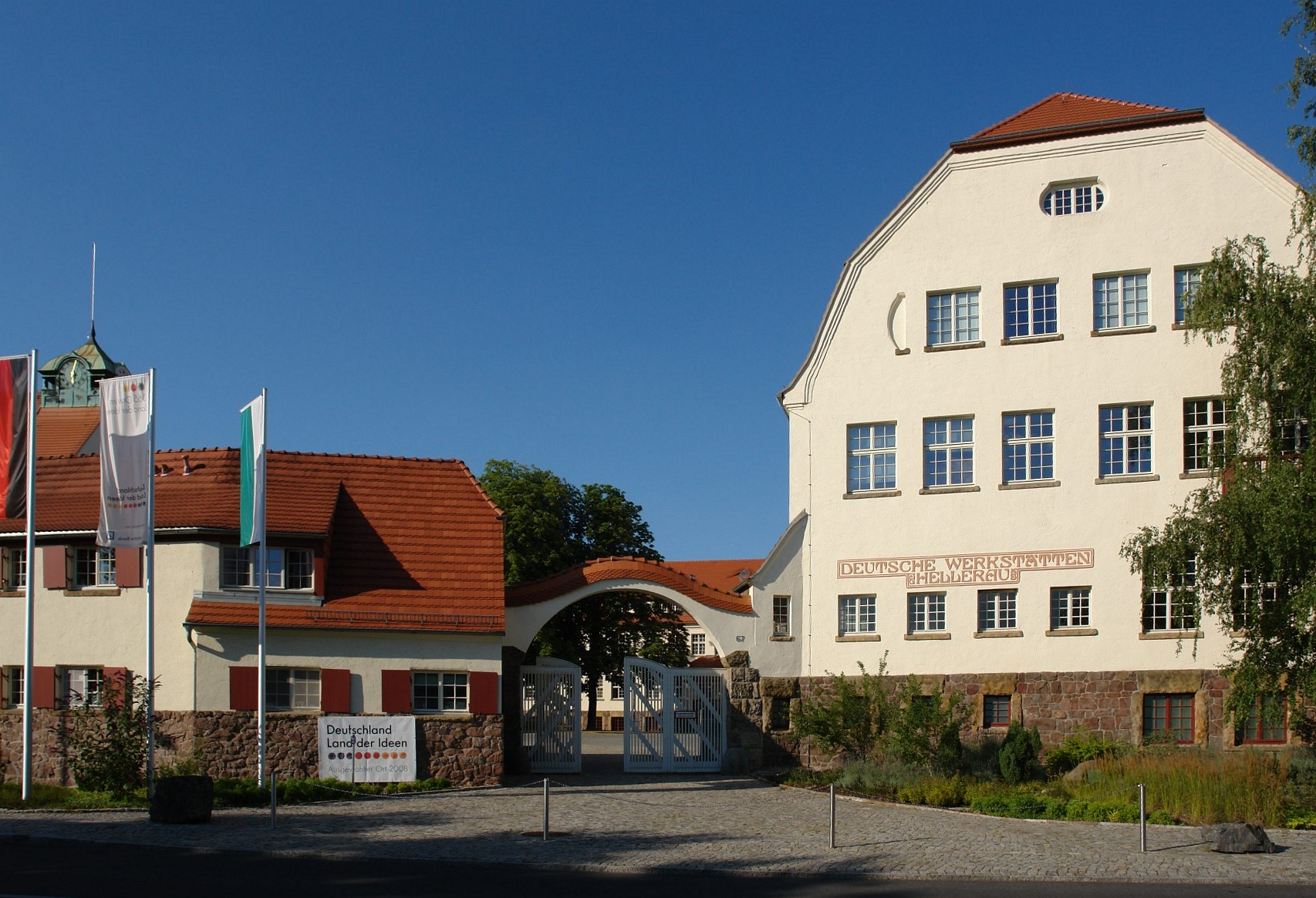 Deutsche Werkstätten Hellerau Altbau